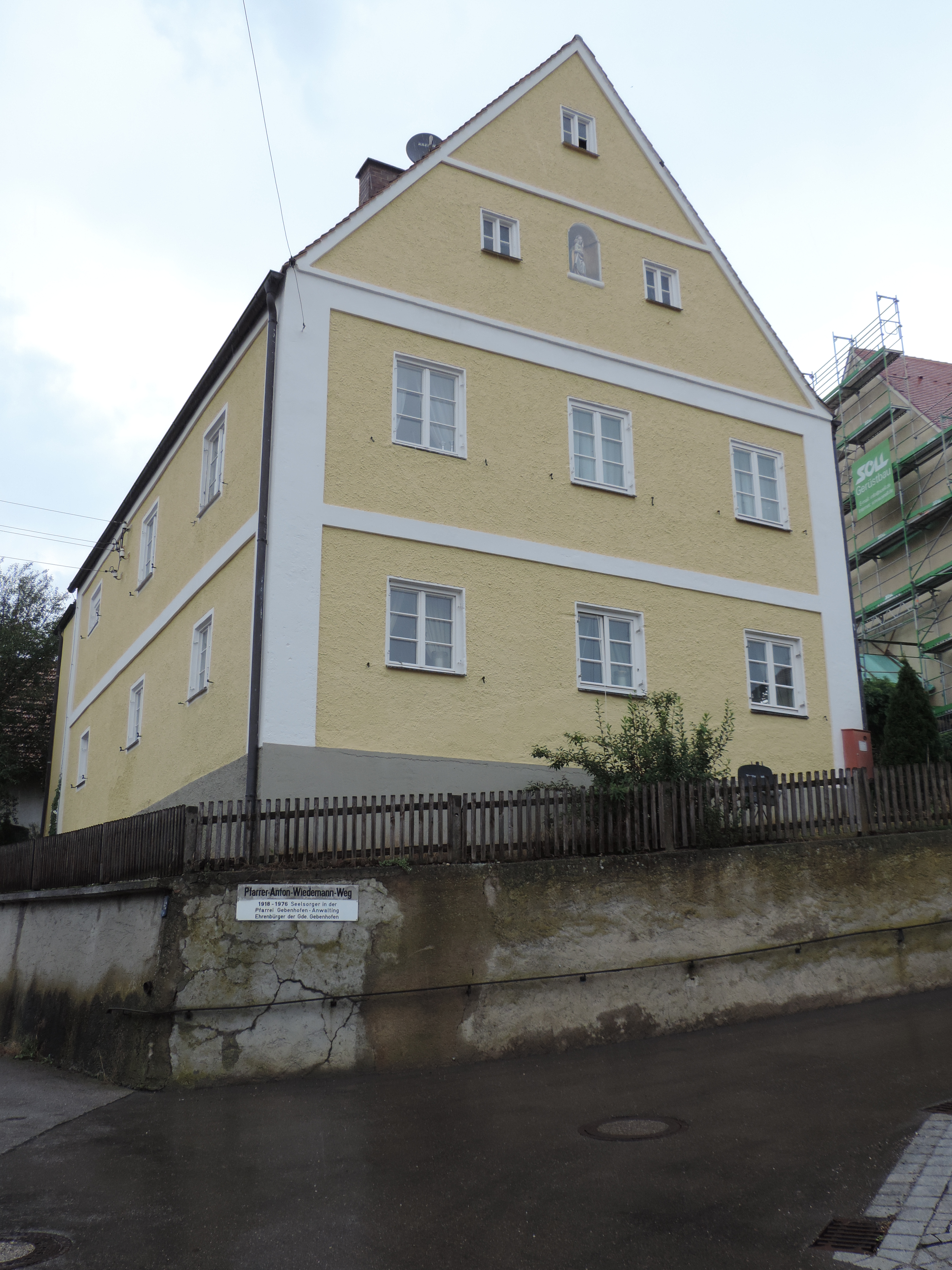 Pfarrhaus zweigeschossiger Satteldachbau mit Putzgliederung, 1718. Pfarrer-Wiedemann-Weg 3